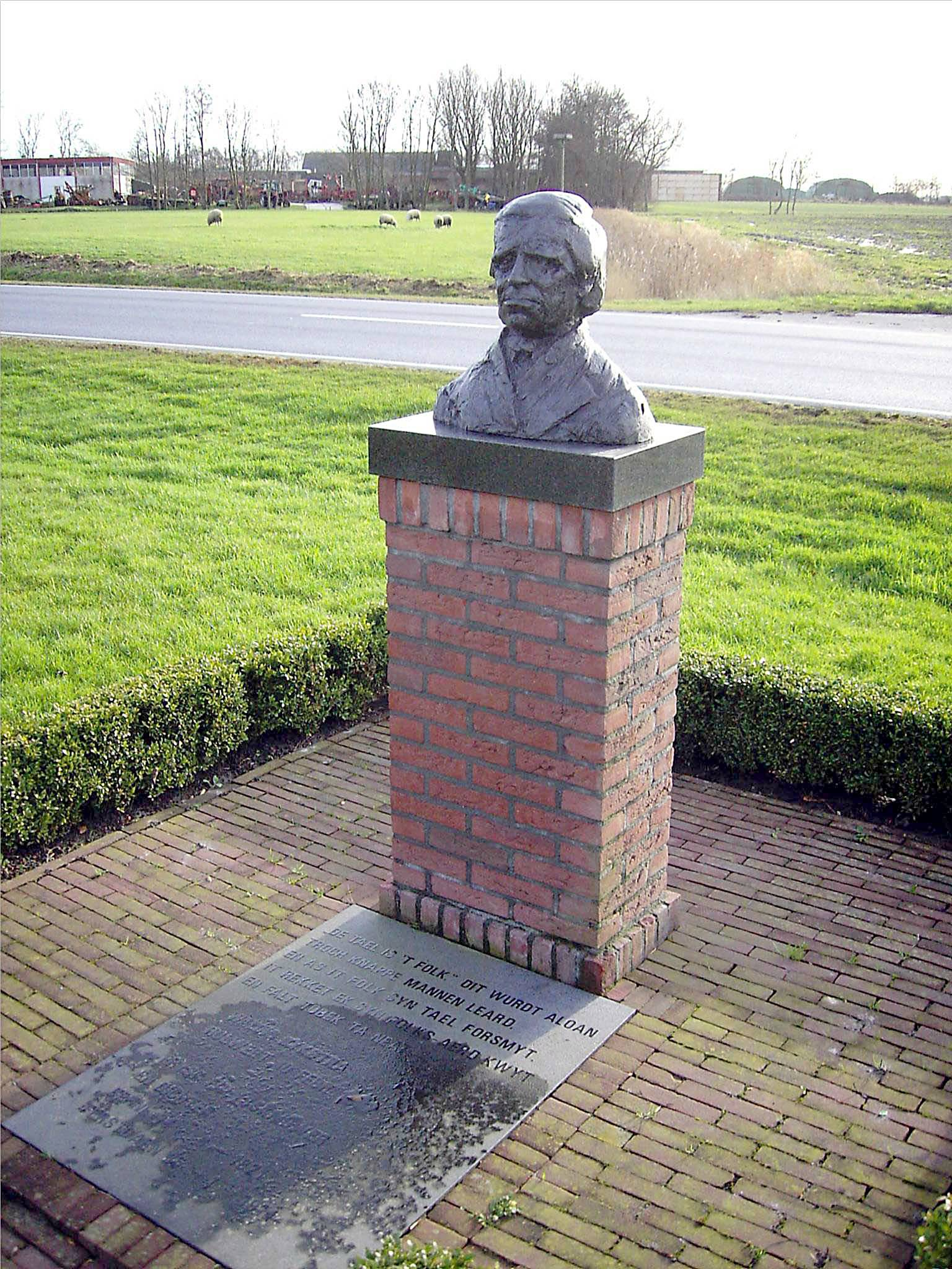 Kunstenaar: Chris Fokma